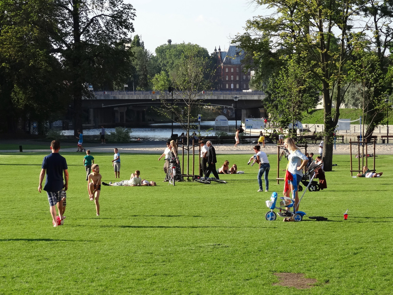 Łąka rekreacyjna na Wyspie Młyńskiej w Bydgoszczy.